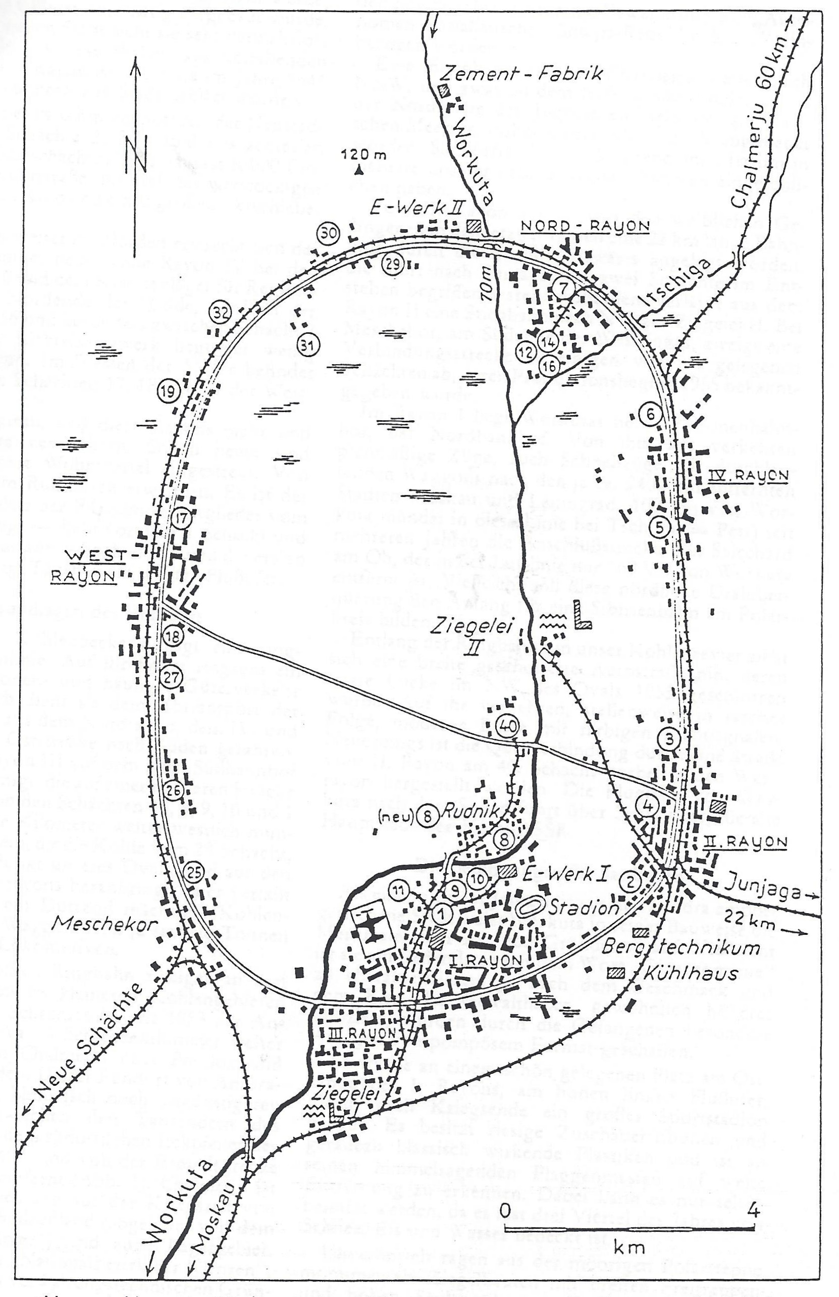 Lageskizze des Arbeitslagers Workuta. In den Kreisen die Nummern der Schächte.